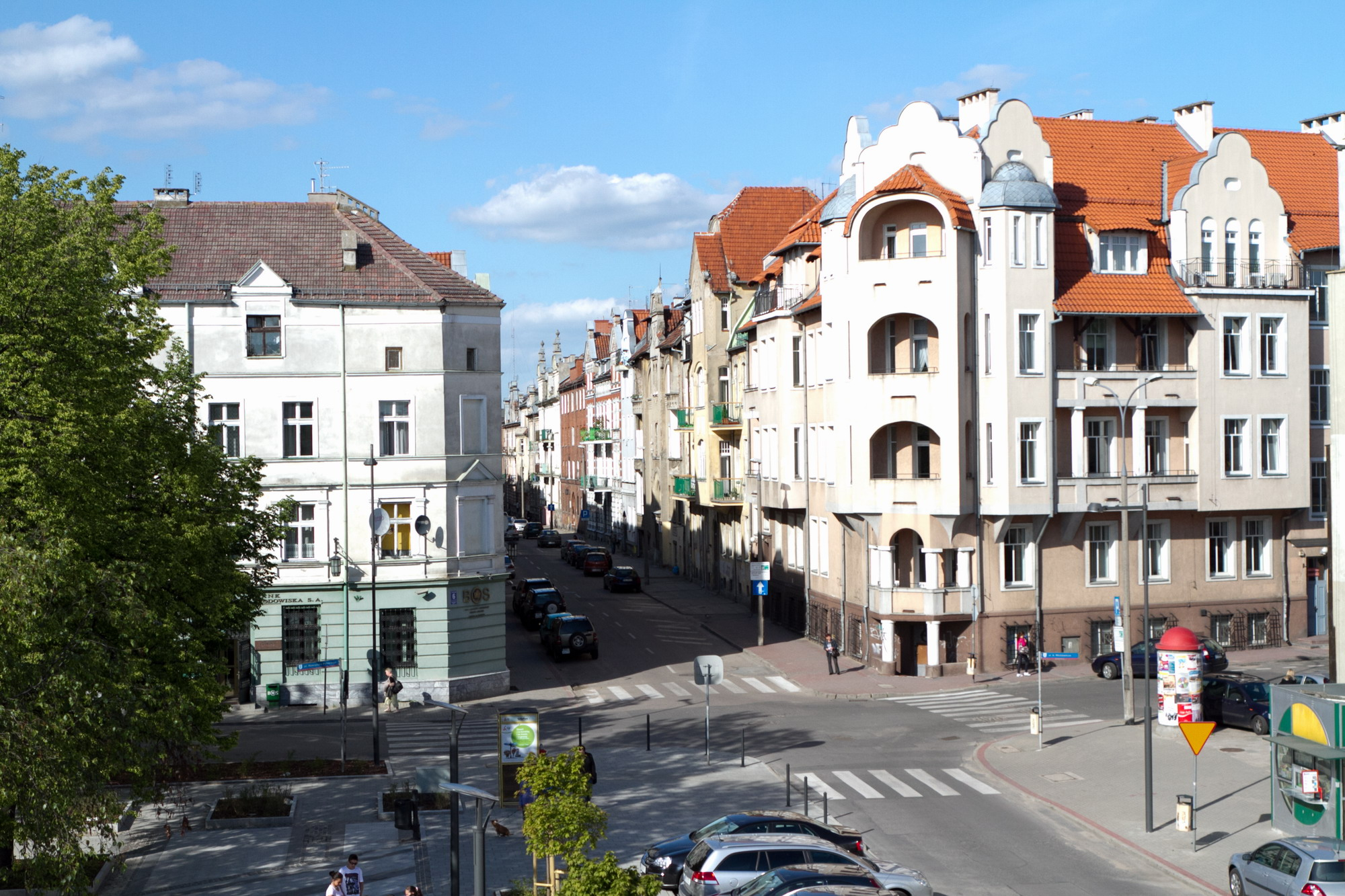 Ulica Warmińska w Olsztynie Unknown